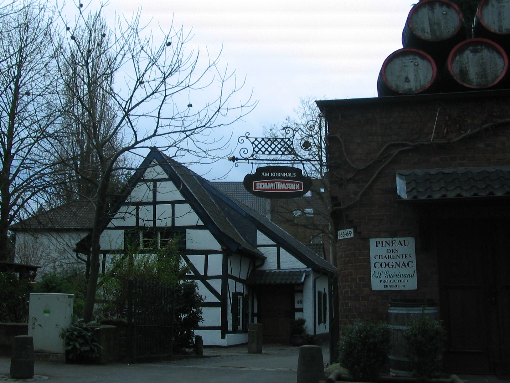 „Altes Kornhaus“ der Familie Schmittmann in Düsseldorf-Niederkassel Niederkasseler Straße 106. Edelkorn-Brennerei und Likörfabrik